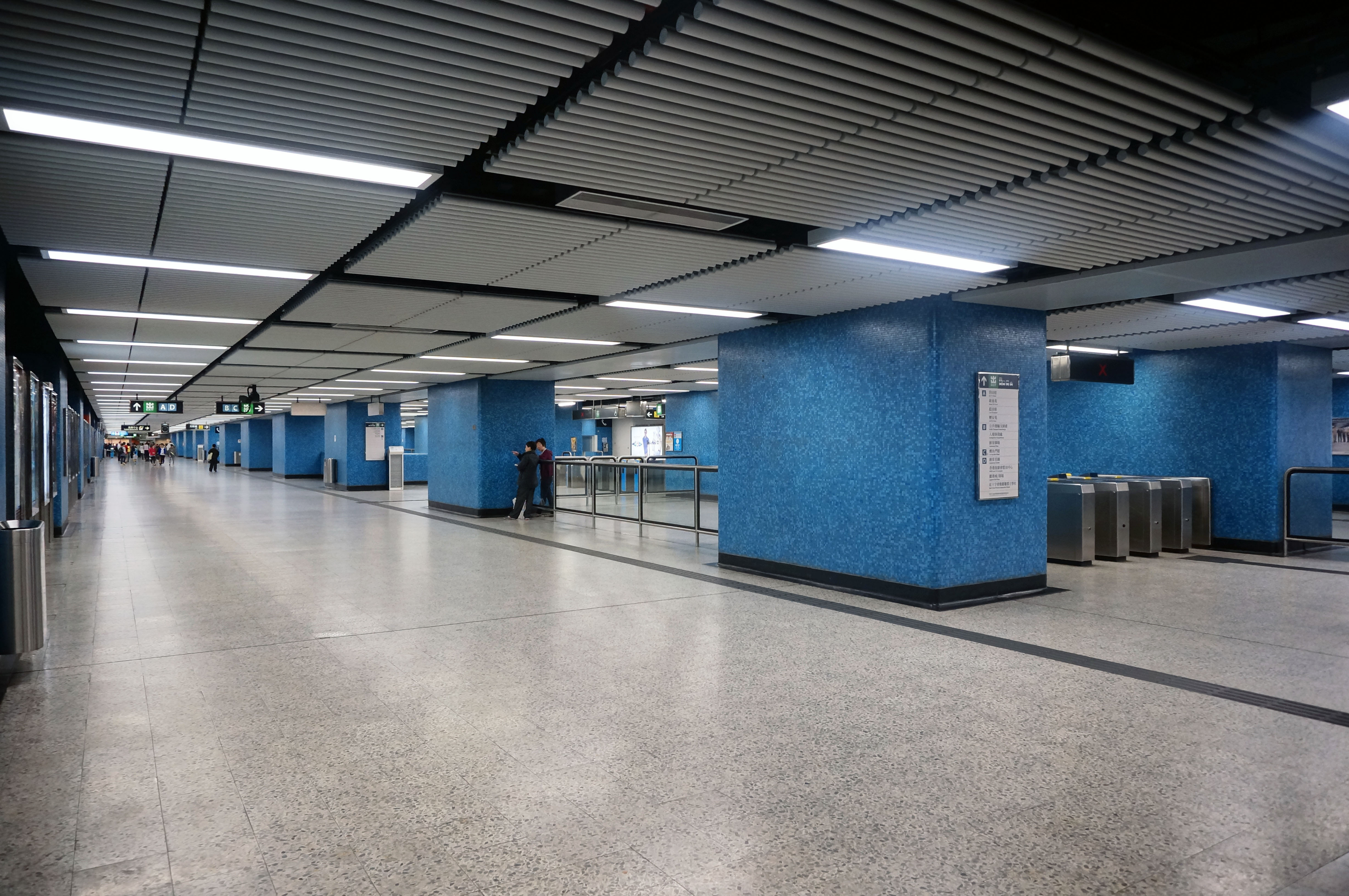 港鐵藍田站大堂